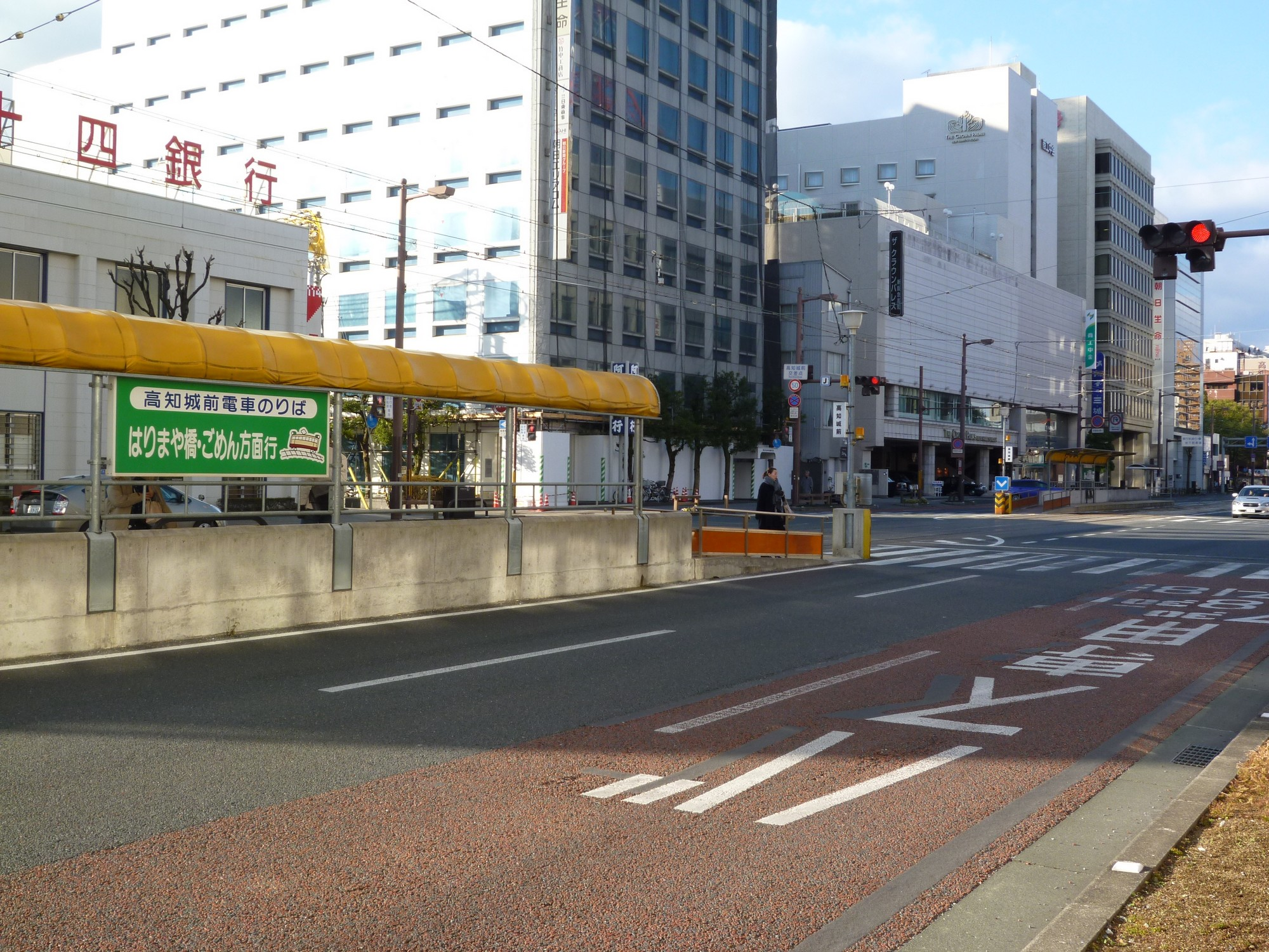 2015年1月2日撮影。